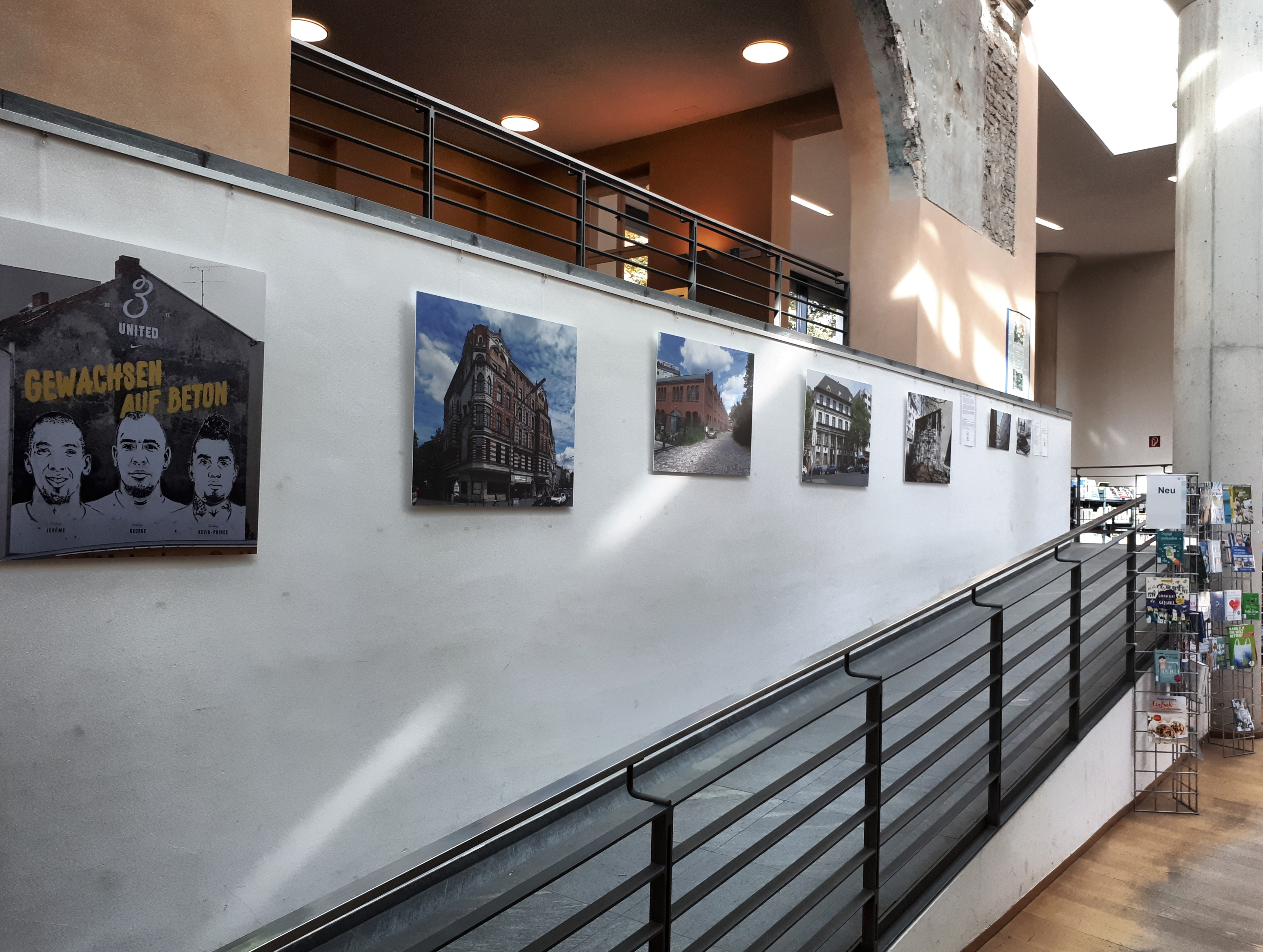 WikiWedding Ausstellung 2018 Bibliothek am Luisenbad